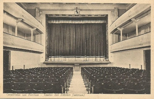 Teatro del Littorio (oggi Teatro del Popolo) a Concordia sulla Secchia